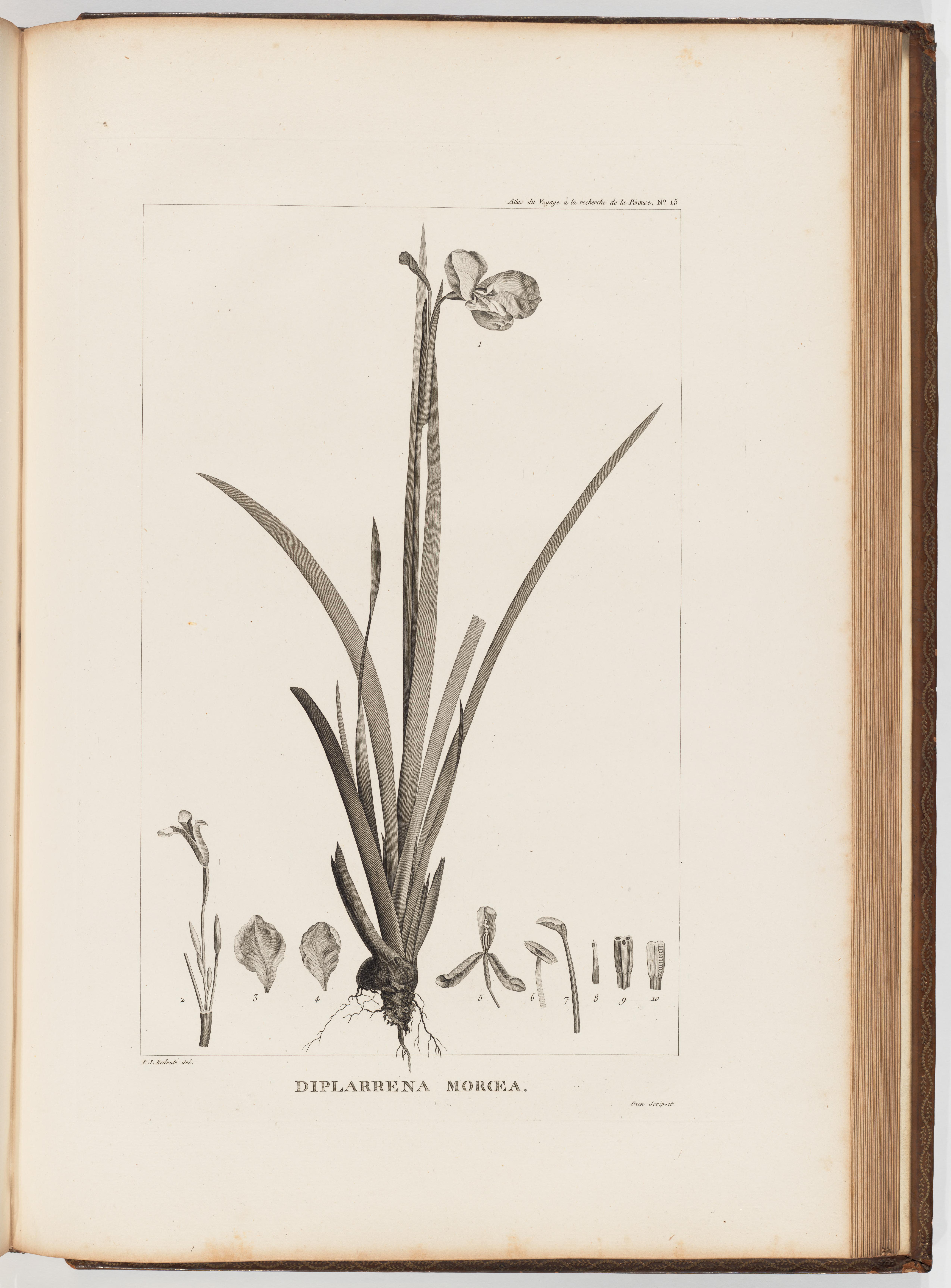 Voyage de La Pérouse autour du monde /publié conformément au décret du 22 avril 1791, et rédigé par L.A. Milet-Mureau.